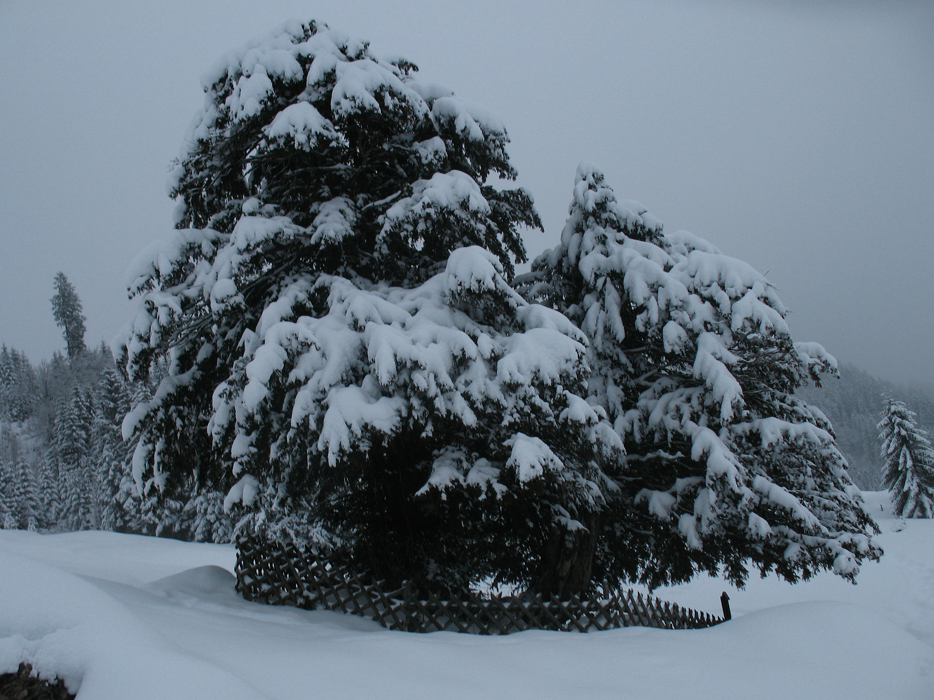 Die Alte Eibe von Balderschwang in der West-Ansicht.